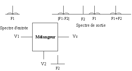 Schéma créé par Lucien Duval 1er mai 2006 à 17:34 (CEST)